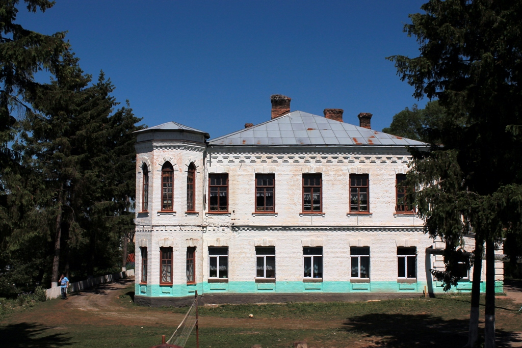 Садибний будинок (мур.), село Тарноруда